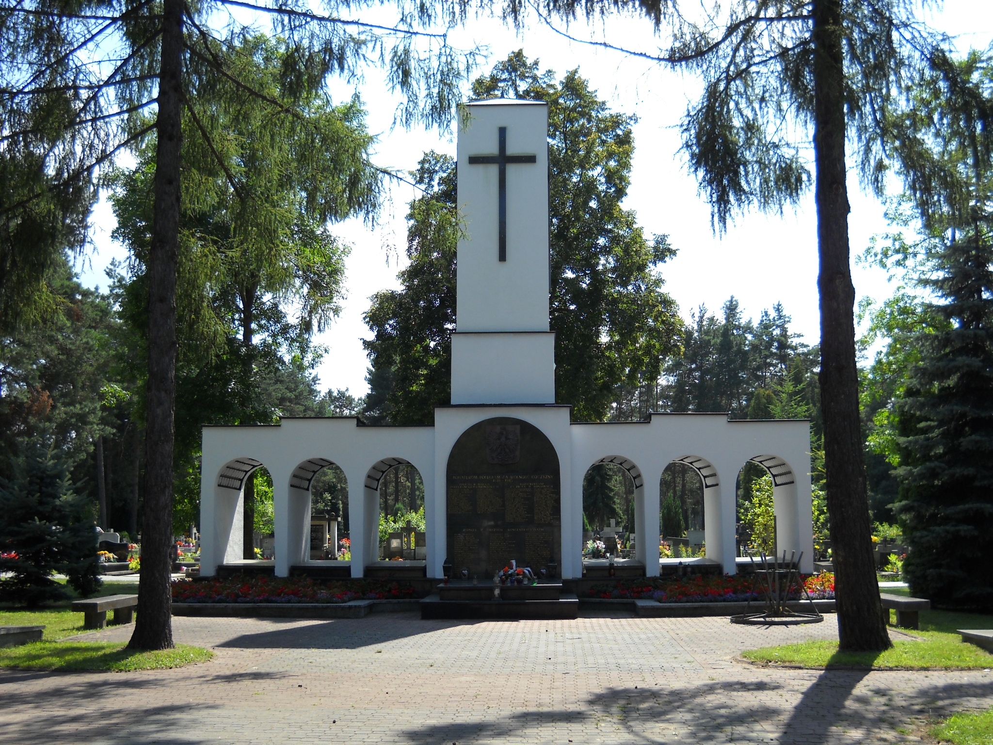 Pomnik mieszkańców walczących w latach 1939-1945 walczących o pokój.